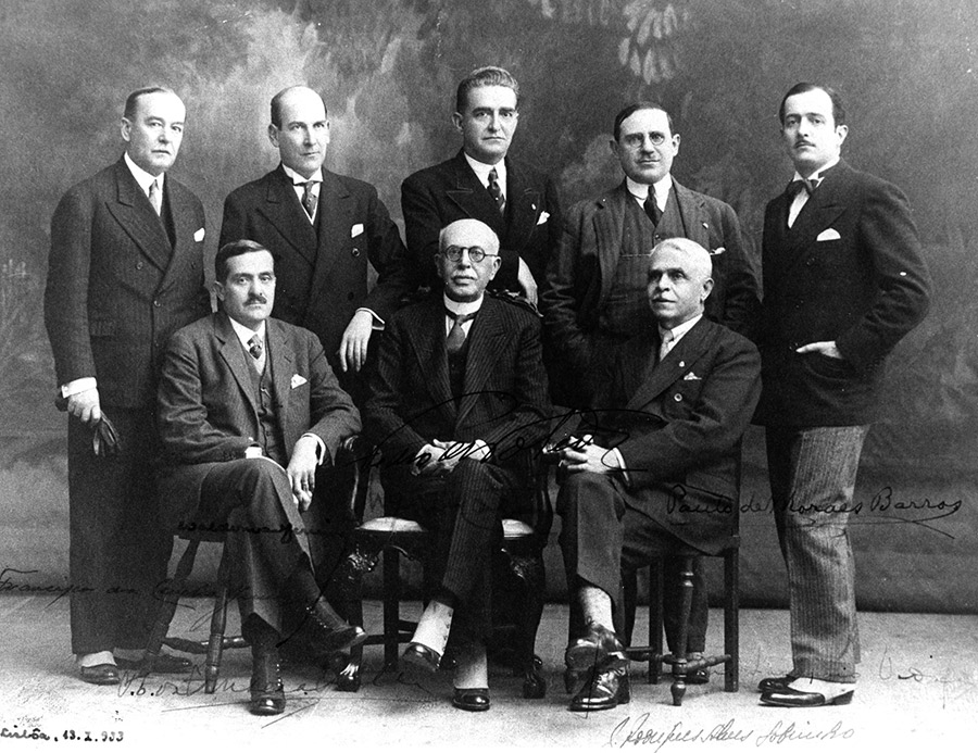 O governador do Estado de São Paulo Pedro de Toledo ladeado pelo seu Secretariado, vigente de 23 de maio a 2 de outubro de 1932. Em pé (da esquerda p/ direita): Francisco da Cunha Junqueira (Agricultura, Indústria e Comércio); Francisco da Fonseca Teles (Viação e Obras Públicas); Thyrso Queirolo Martins de Sousa (Chefe de Polícia de São Paulo); Rodrigues Alves Sobrinho (Educação e Saúde Pública); Joaquim Sampaio Vidal (Departamento de Administração Municipal). E sentados (da esquerda p/ direita): Waldemar Ferreira Martins (Justiça e Segurança Pública); Pedro de Toledo (governador de São Paulo); e Paulo de Morais Barros (Fazenda). O registro foi feito no exílio político em Lisboa, Portugal, em 13 de fevereiro de 1933, conforme indicações na própria imagem, autografada por todos eles. Em 23 de maio de 1932, à revelia de Getúlio Vargas e conforme os anseios paulistas, Pedro de Toledo compôs o secretariado de seu governo, registrado nessa imagem histórica. Pedro Manuel de Toledo (1860-1935) foi interventor federal do Estado de São Paulo de 7 de março a 10 de julho de 1932, e nessa última data foi aclamado pelo povo como Governador do Estado, após ser deflagrada a Revolução Constitucionalista. Exerceu esse cargo até ser deposto em 2 de outubro de 1932, data em que se encerrou oficialmente aquele conflito.